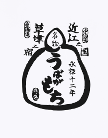 うばがもちや ロゴ